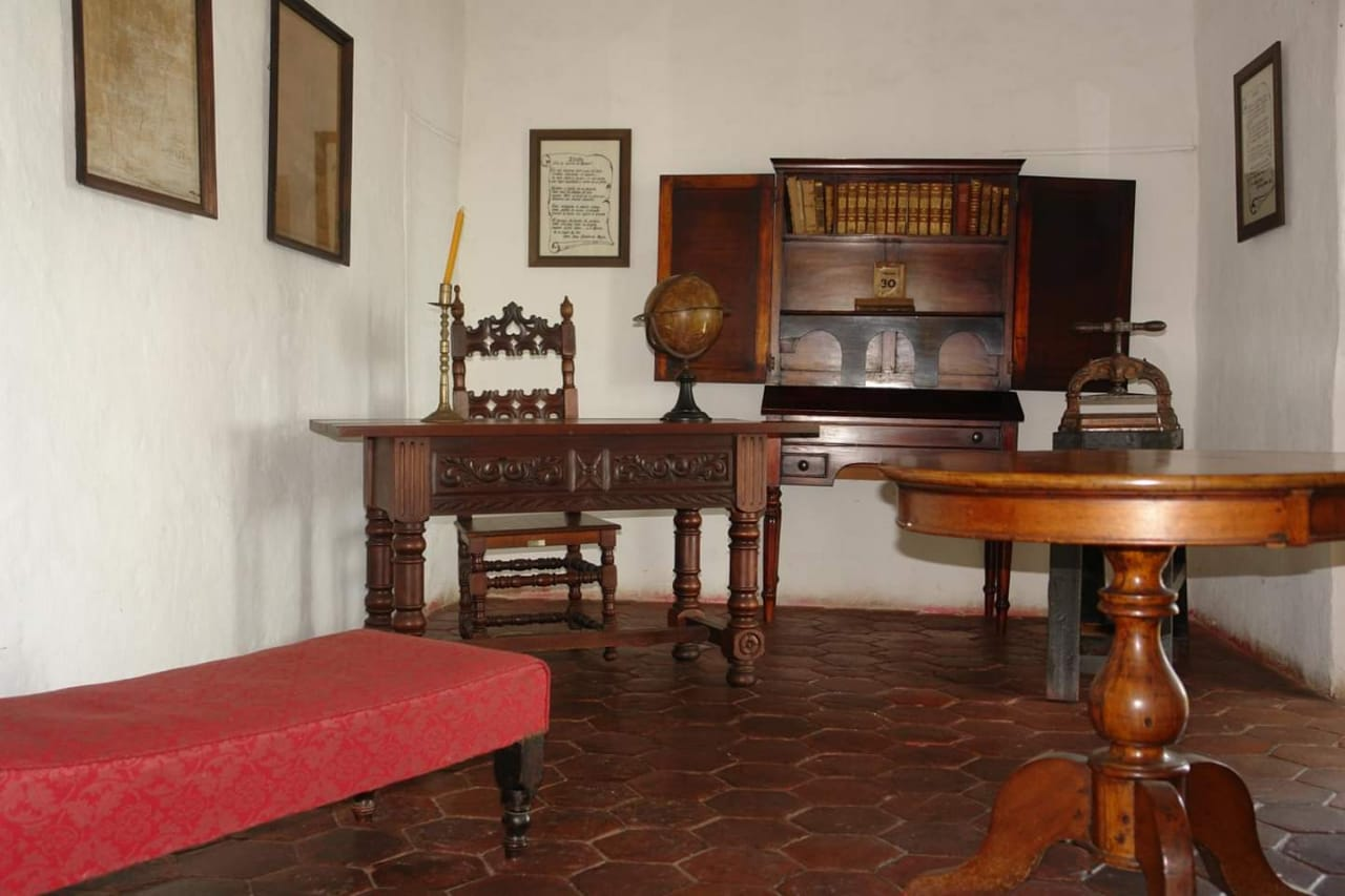 este lugar inspiró Jorge Isaacs a escribir la maria Esta fotografía fue tomada en un área protegida de Colombia con el código 76248 del RUNAP.